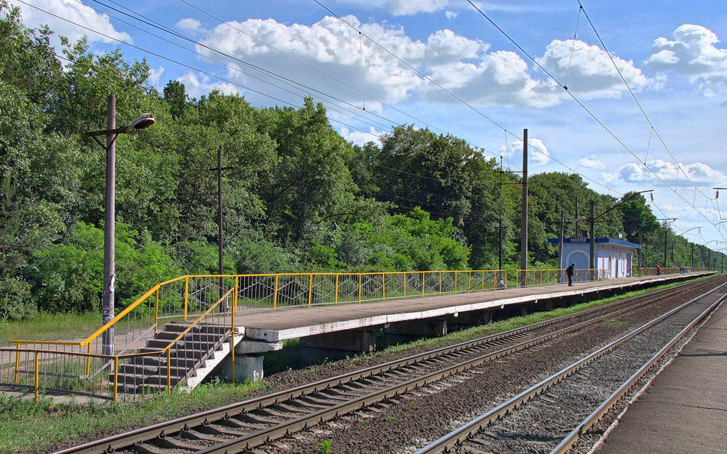 Платформа парного напрямку